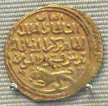 Baybars_dinar_1260_1277